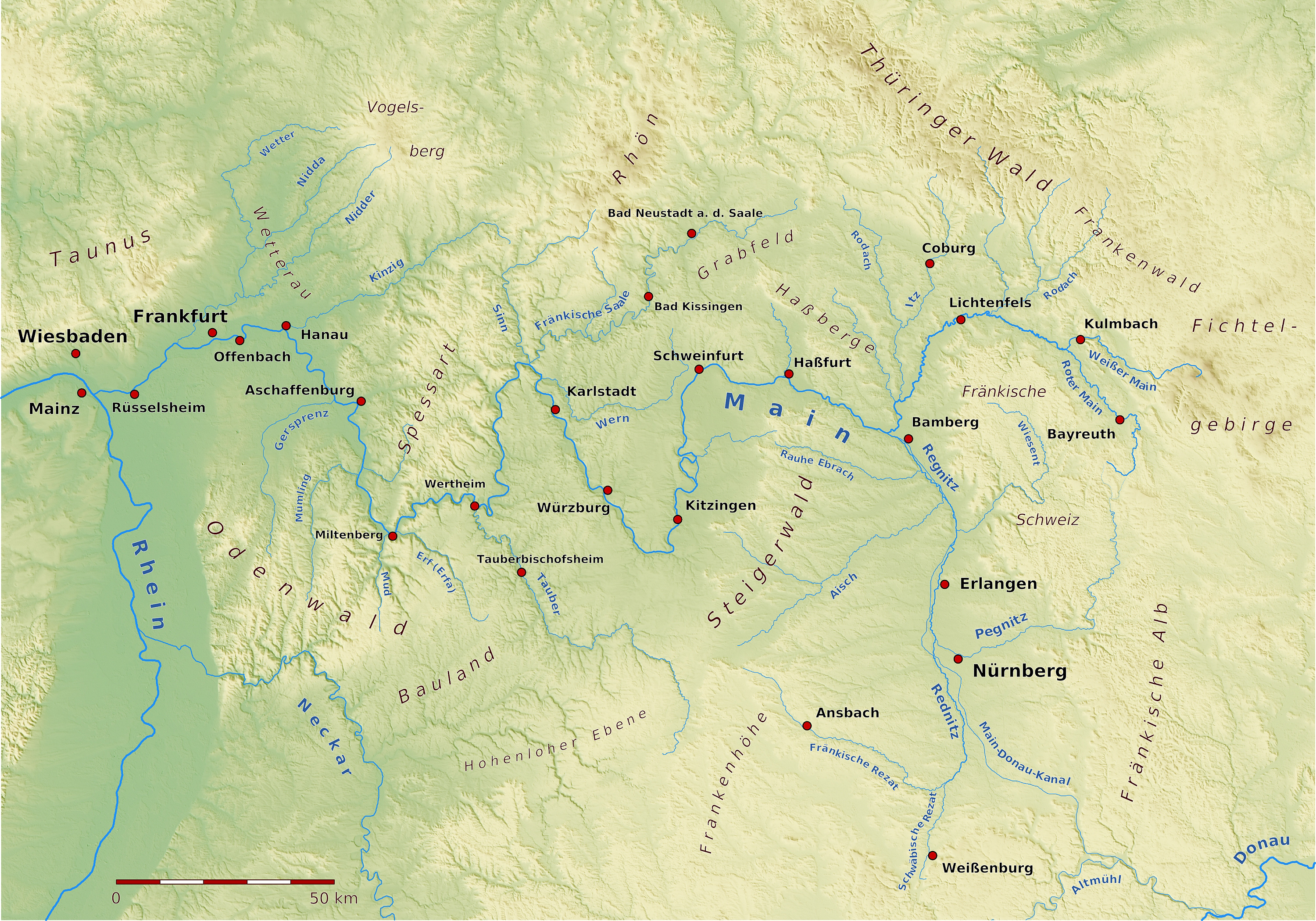 Karte des Verlaufs des Flusses Main Erstellt unter Zuhilfenahme von SRTM-Daten, Quantum GIS, Generic Mapping Tools, GPS-Trackmaker